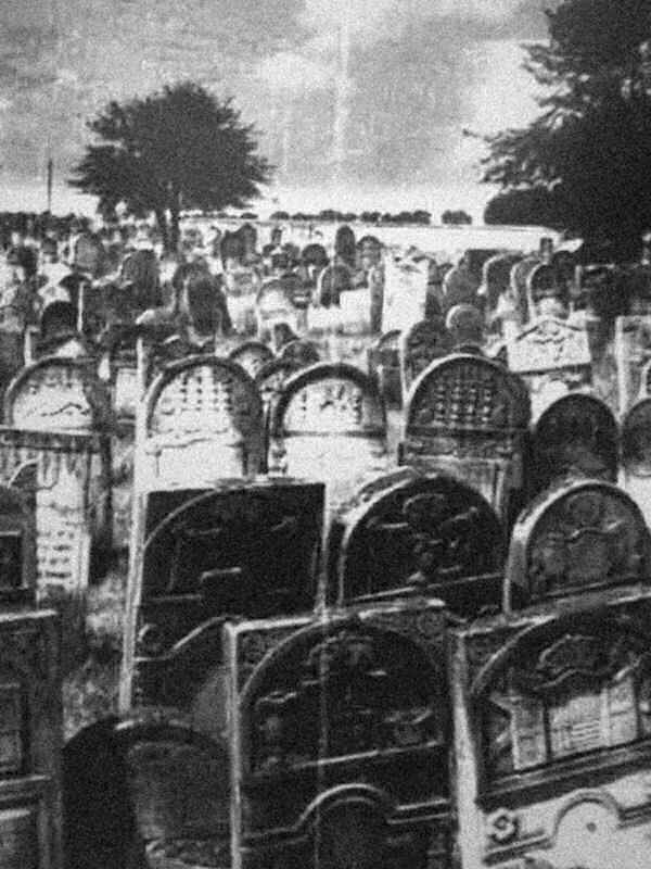 Cmentarz Żydowski w Szydłowcu.